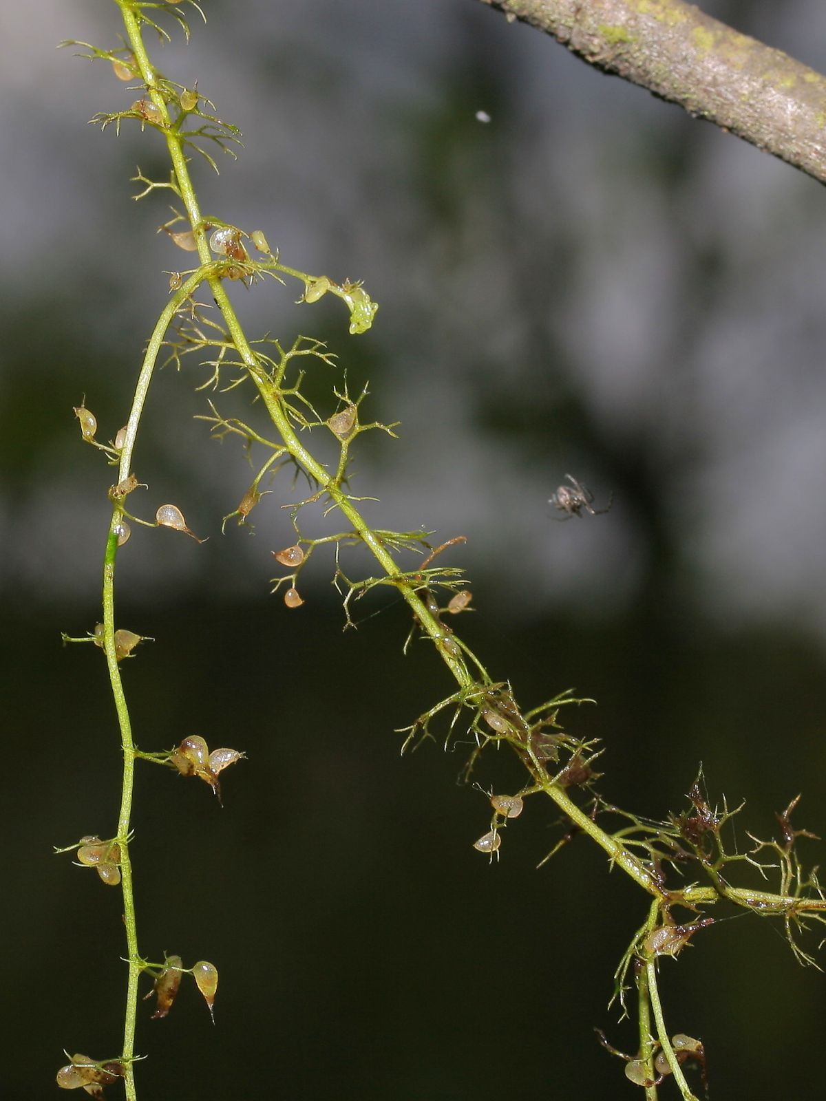 Kleiner Wasserschlauch Utricularia minor